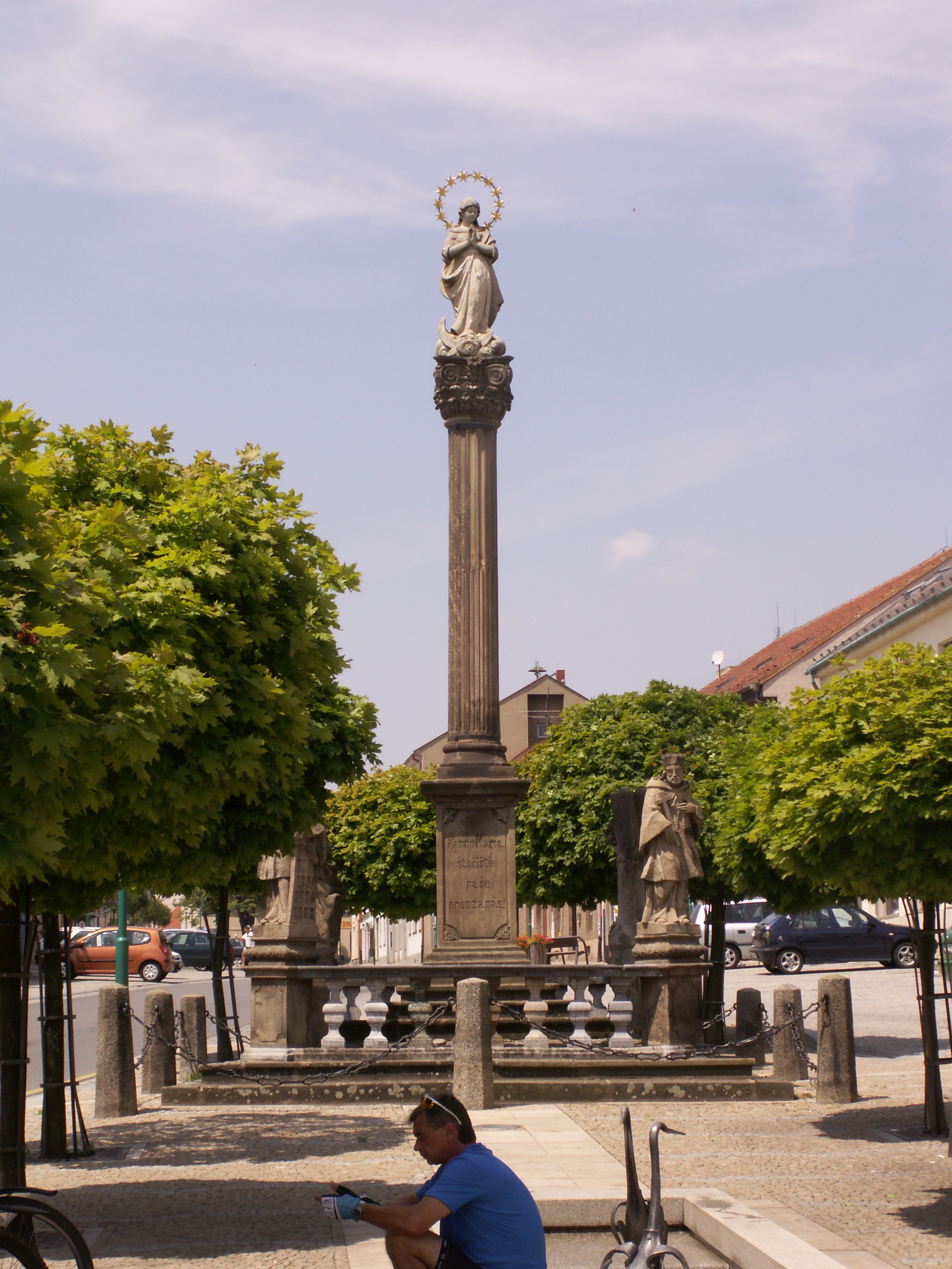 Sloup se sousoším - Mariánský sloup (Bystřice nad Pernštejnem), nám. 9. května, Bystřice nad Pernštejnem